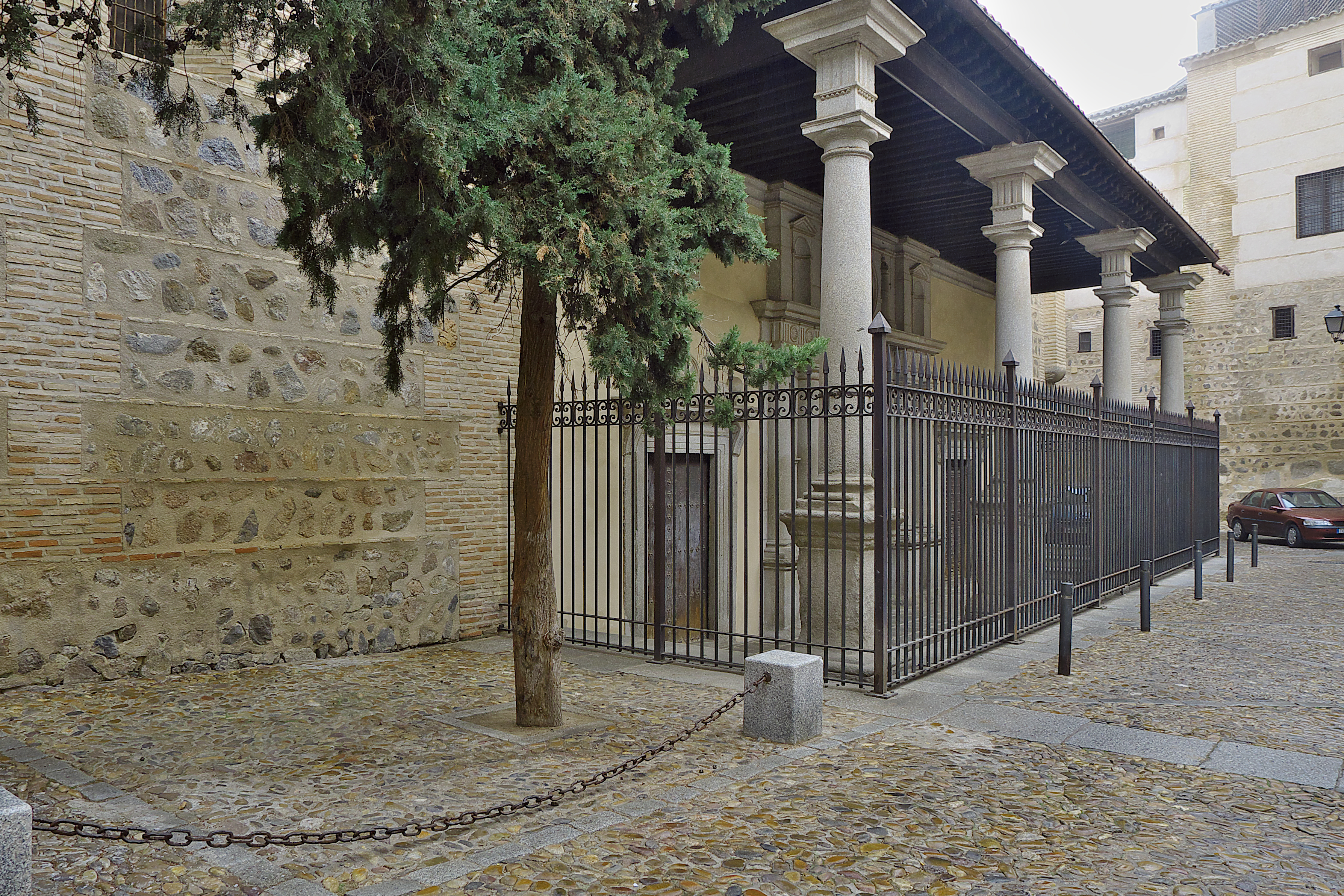 Portada de la iglesia